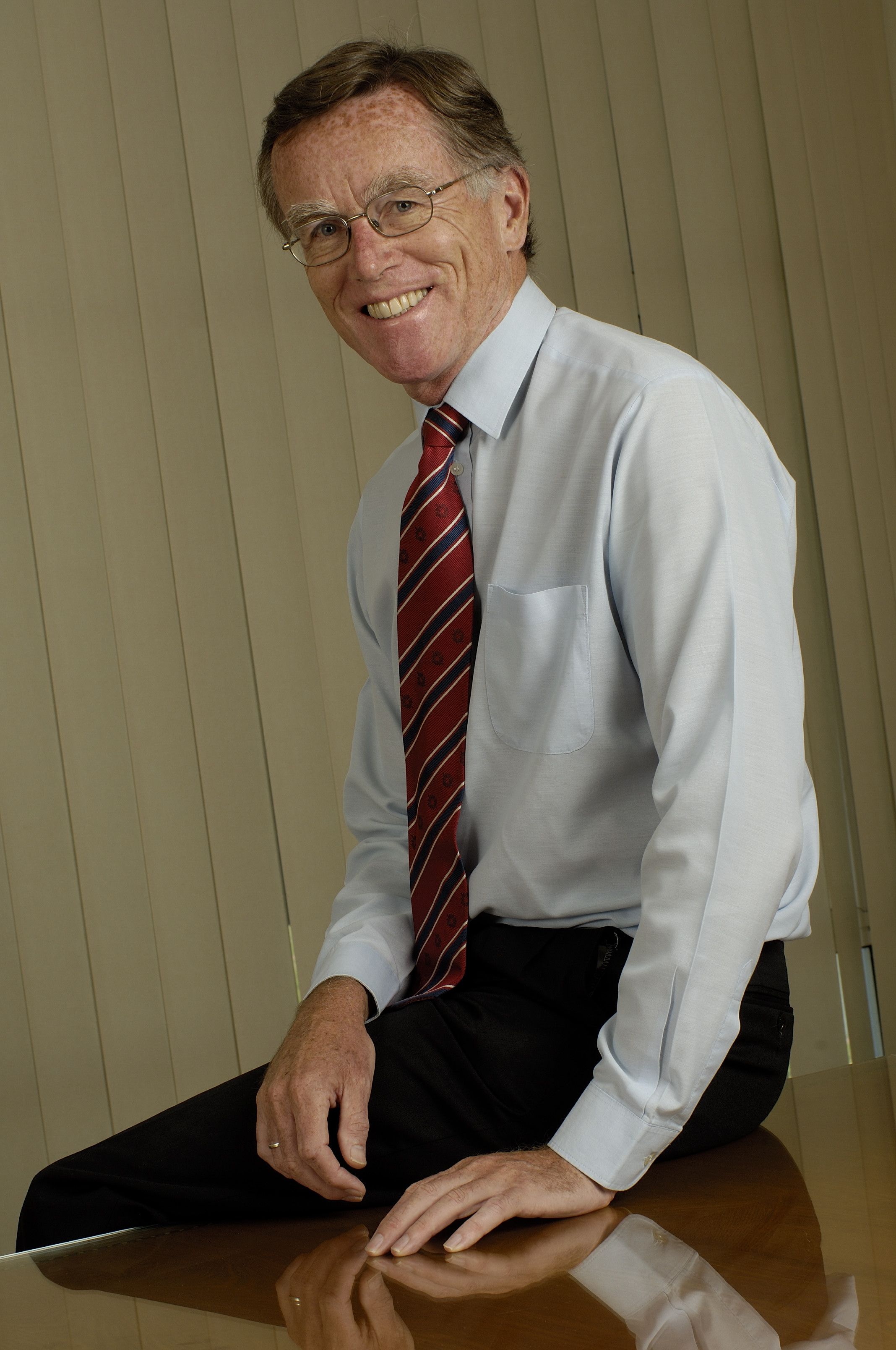 Eduard Bomhoff.